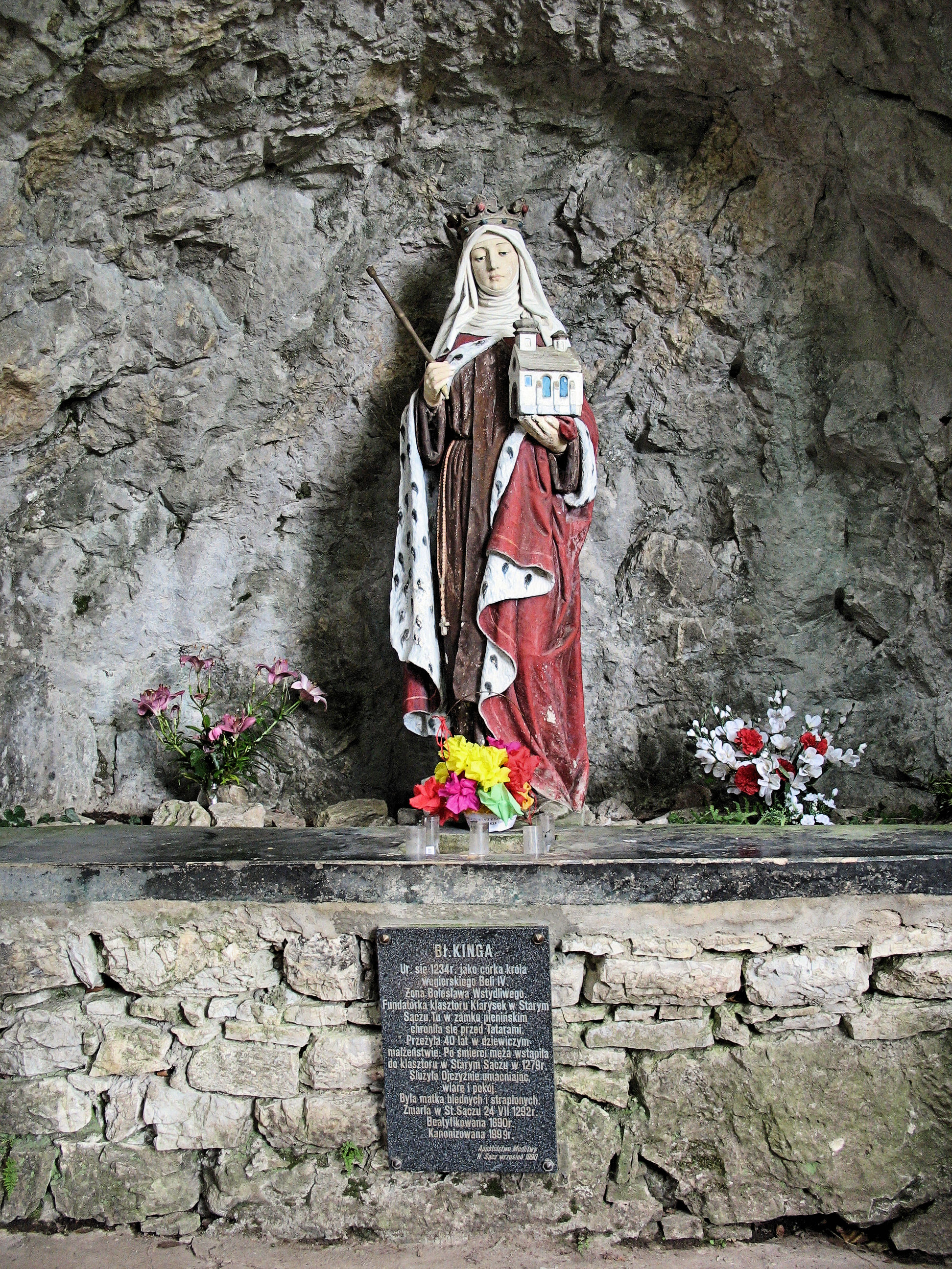 Zamkowa Góra - Błogosławiona Kinga